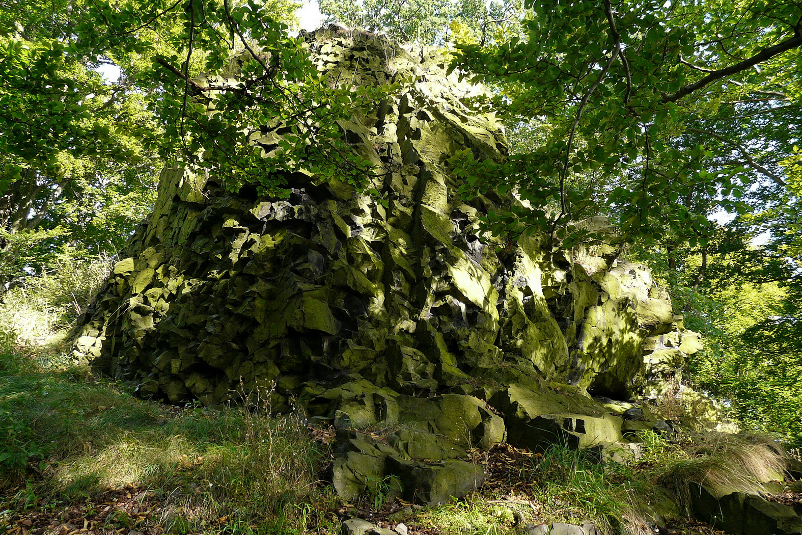 Čedičový vrchol Pecopaly